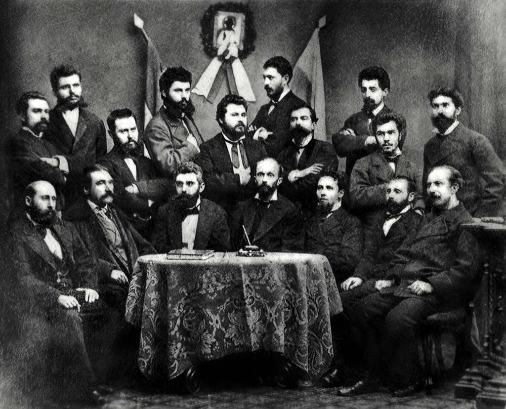 Лидерите на Либералната партия при основаването й, Търново, 1879